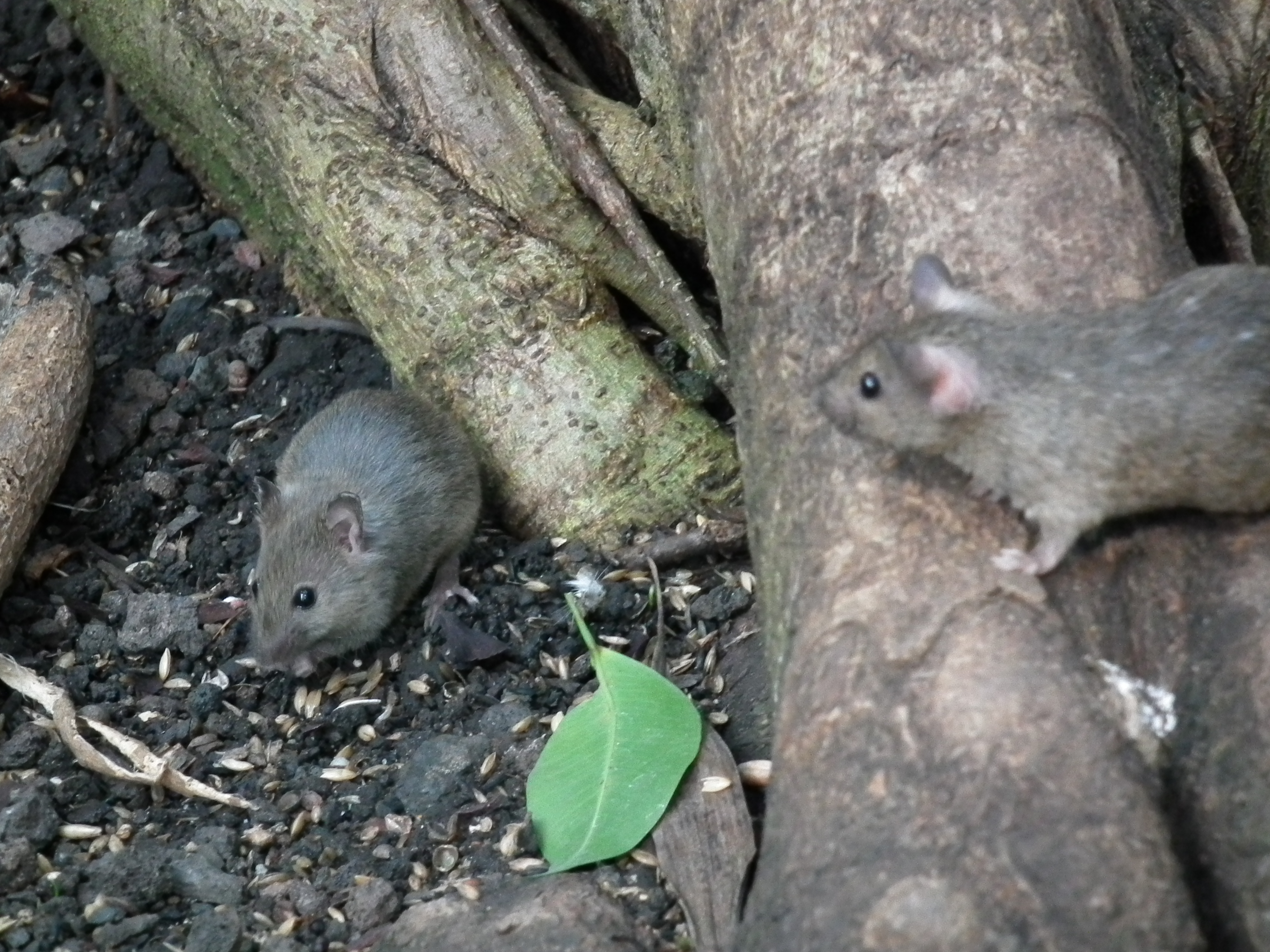 Zwei Hausmäuse (Mus musculus), fotografiert im nördlichen Baden-Württemberg (Deutschland)